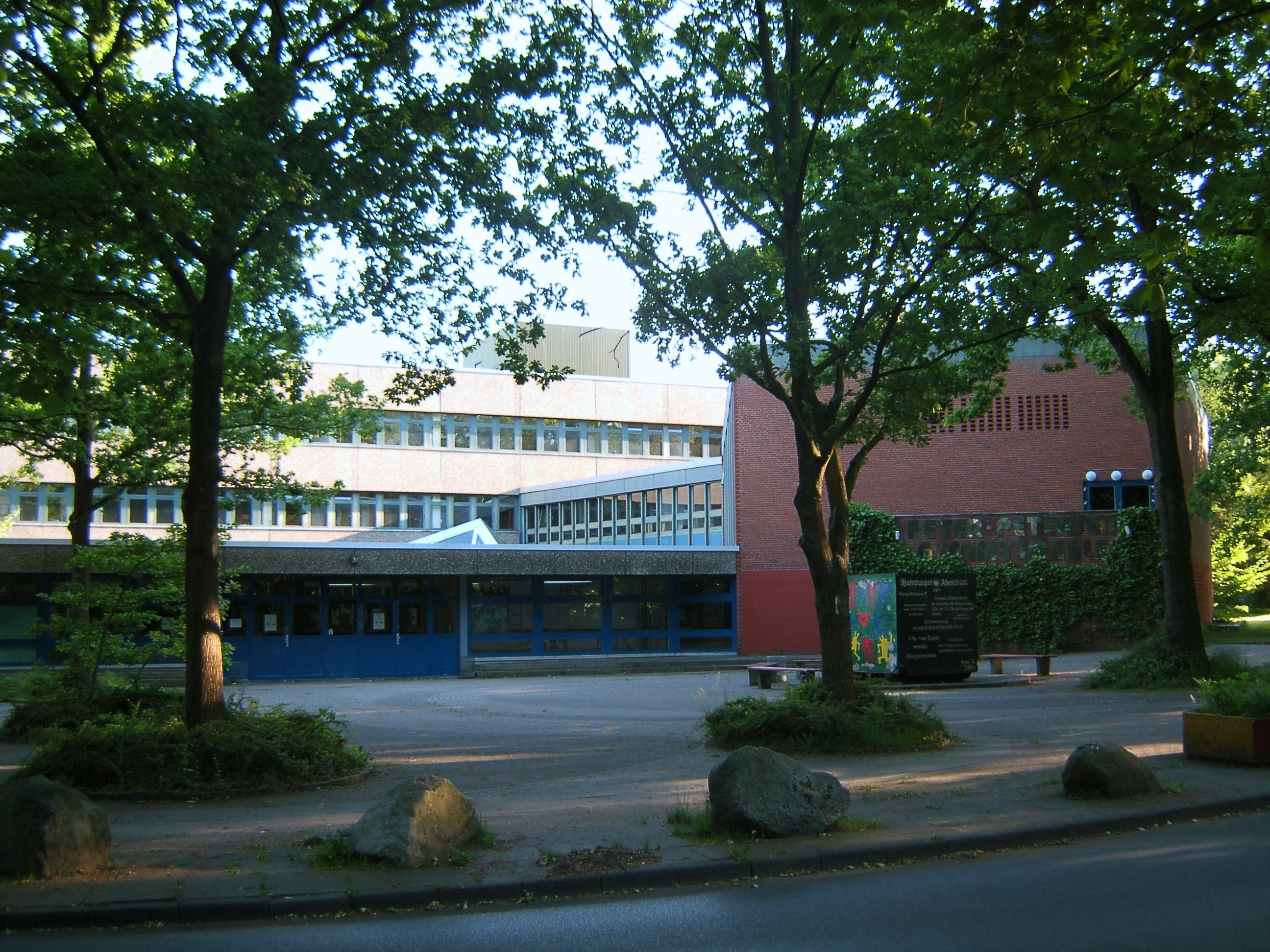 Irena-Sendler-Schule in Wellingsbüttel. Dieses Gebäude ist mit Stand 2017 abgerissen.